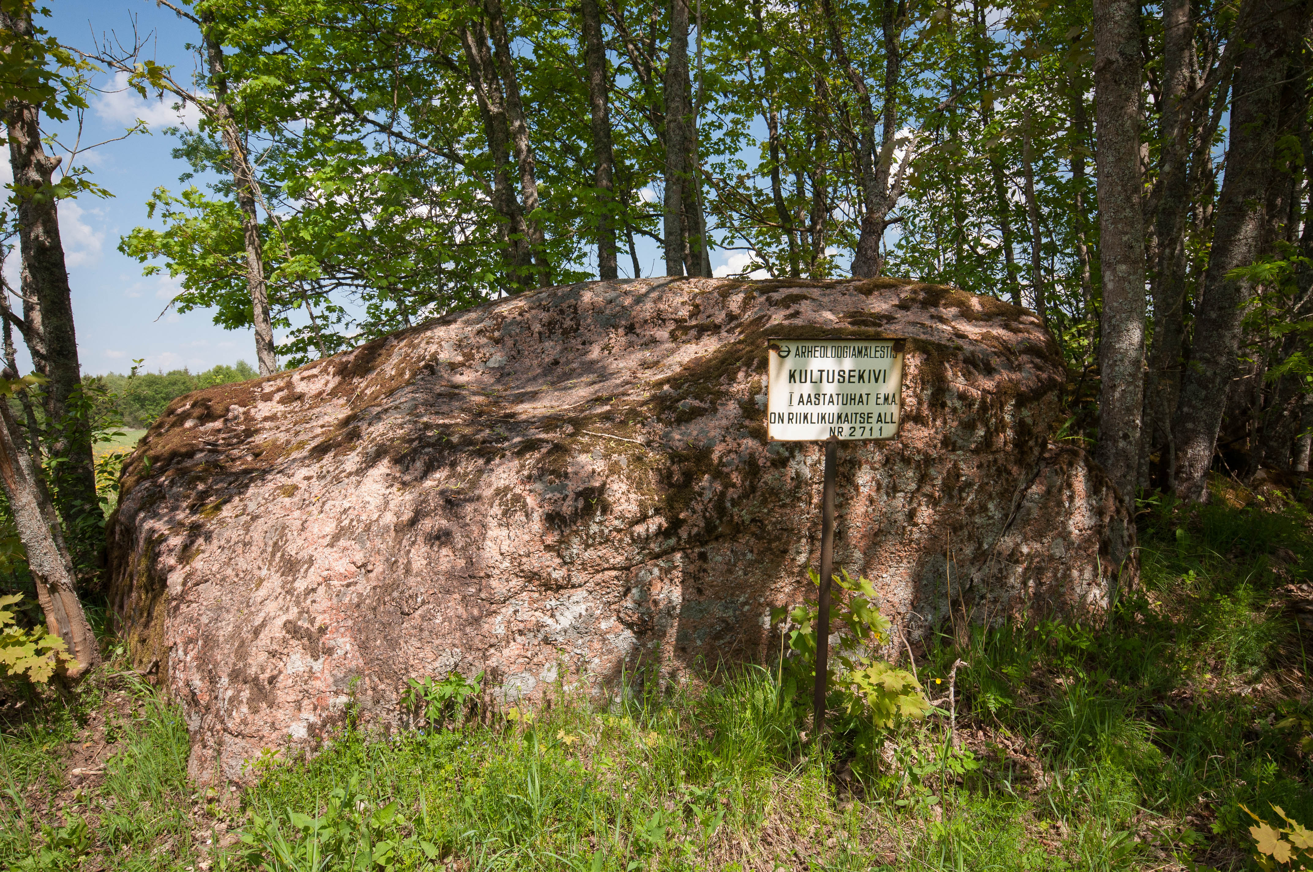 Ussi põllu Suurkivi; (Ussipõllu rändrahn)